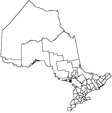 Temiskaming Shores, Ontario